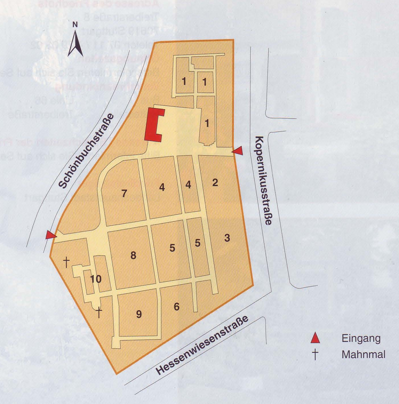 Plan des Friedhofs Rohr in Stuttgart.